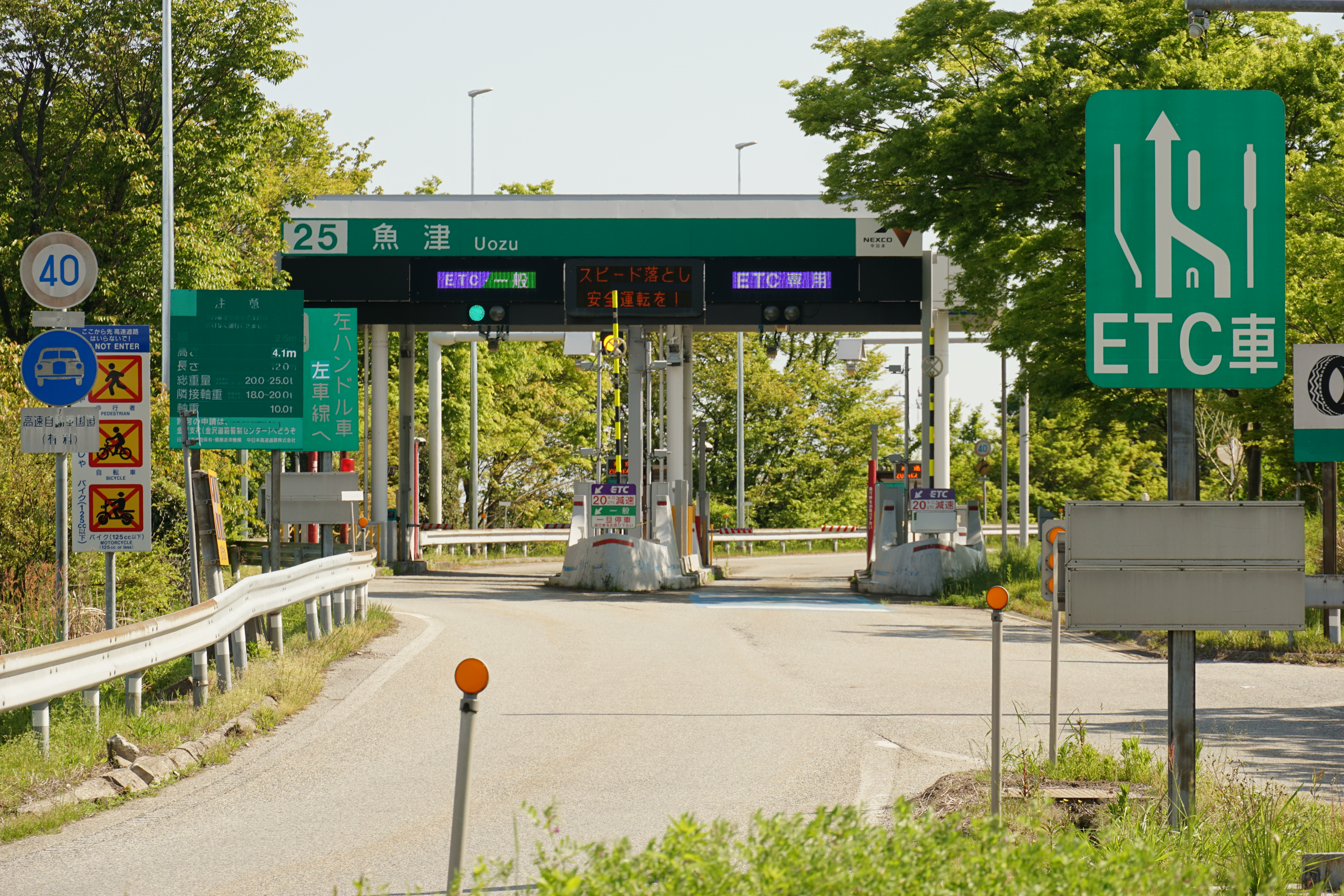 日曜日の朝に撮影。